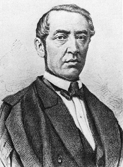 Дмитро Павлович Пильчиков (1821 - 1893), педагог, громадський діяч